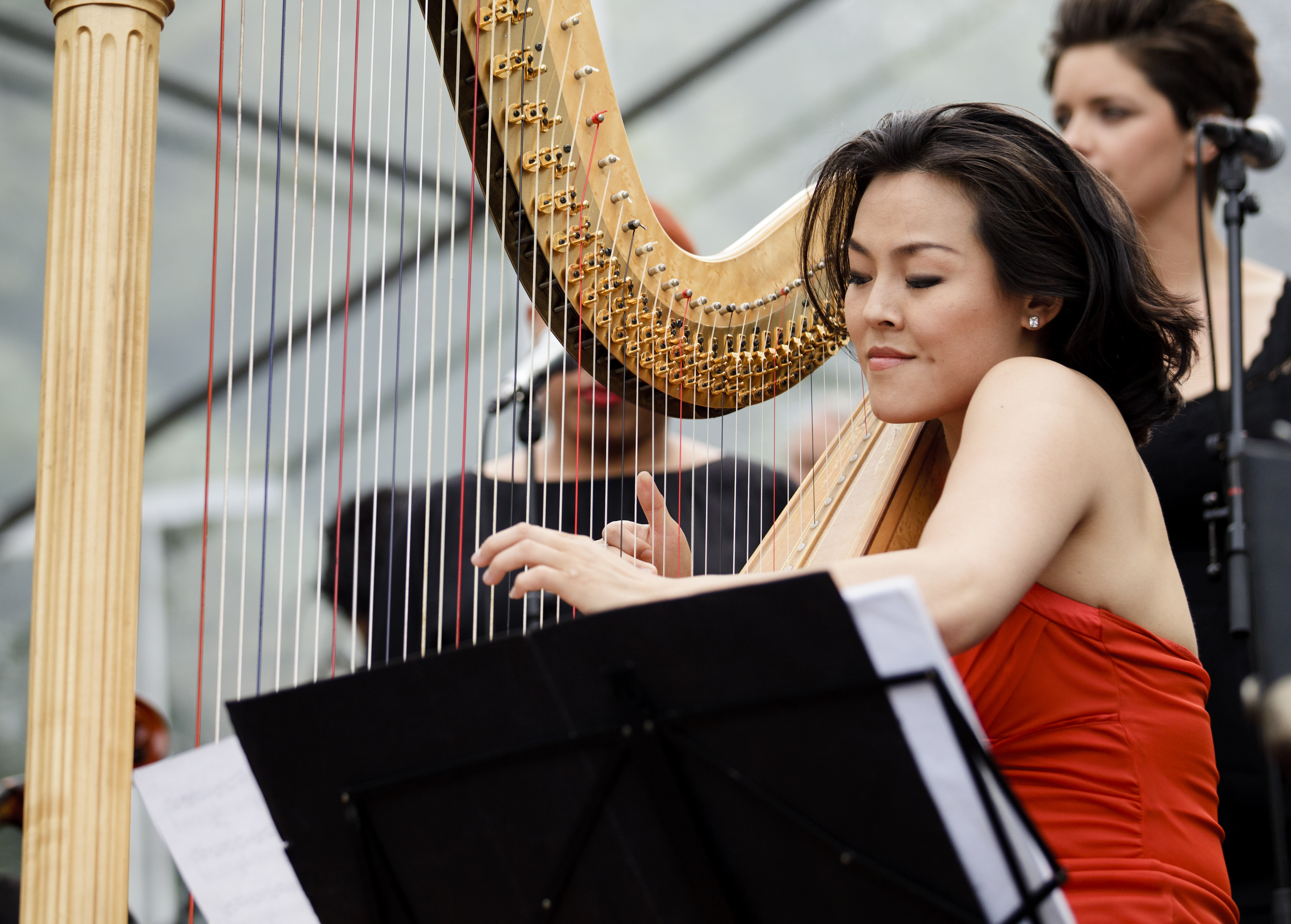 Lavinia Meijer tijdens het Nationaal Concert 2011